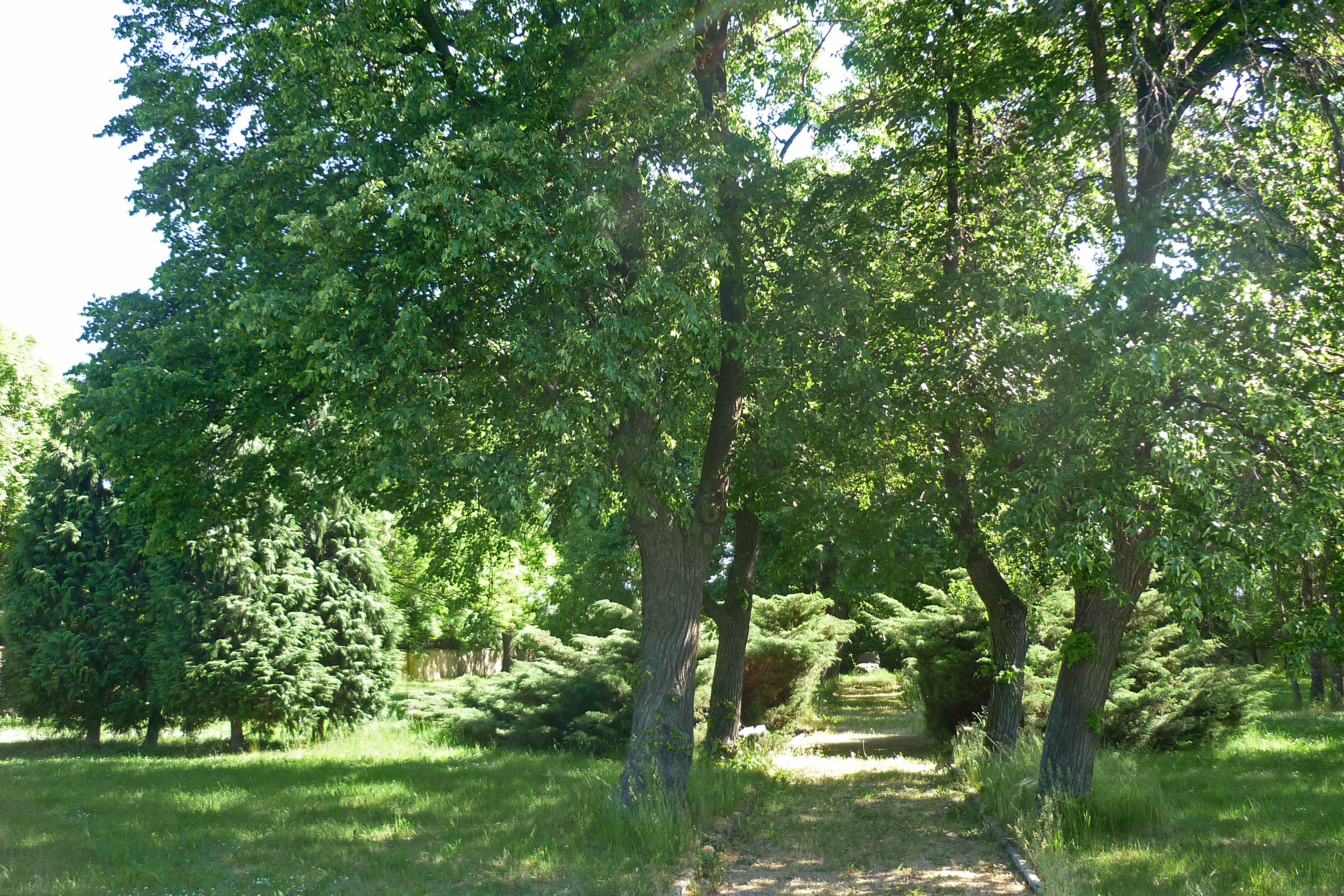 Ehem. Jüdischer Friedhof von Komotau/Chomutov